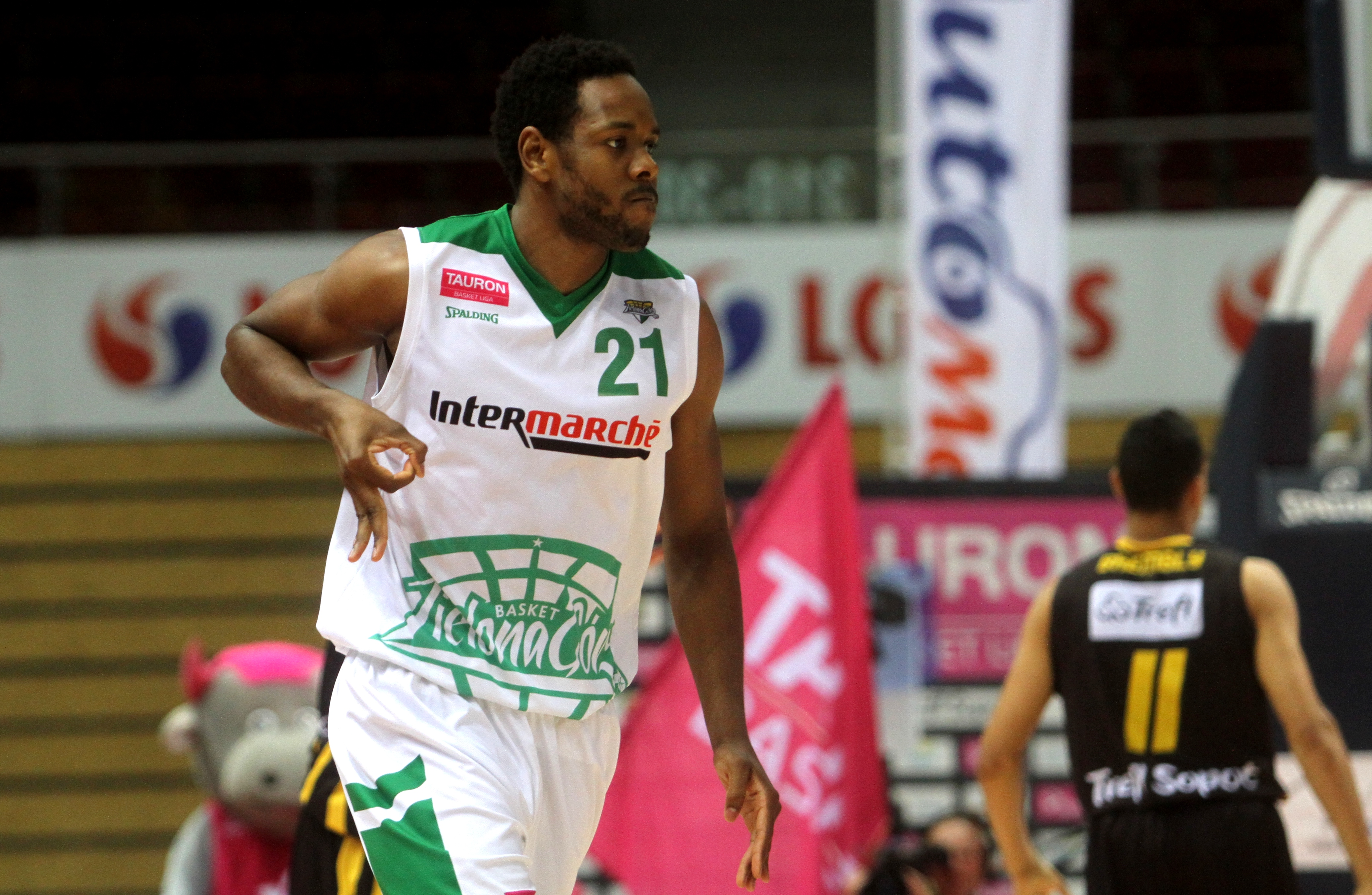 Craig Brackins Stelmet Zielona Góra